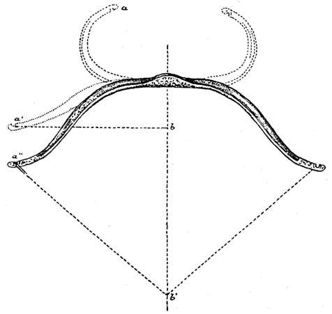 Турецкий лук из рога буйвола, украшен изящными золотыми арабесками по красному лакированному грунту; плечи и спина лука — снаружи, рукоятка — с внутренней стороны расписаны. Изображен: а — без тетивы; а' — с тетивой; а" — в натянутом положении. Трофей, взятый в походе против турок — 1556 или 1566 г.